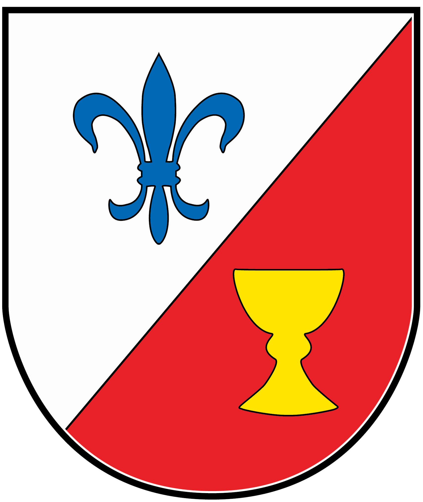 Wappen der Ortsgemeinde Schoden